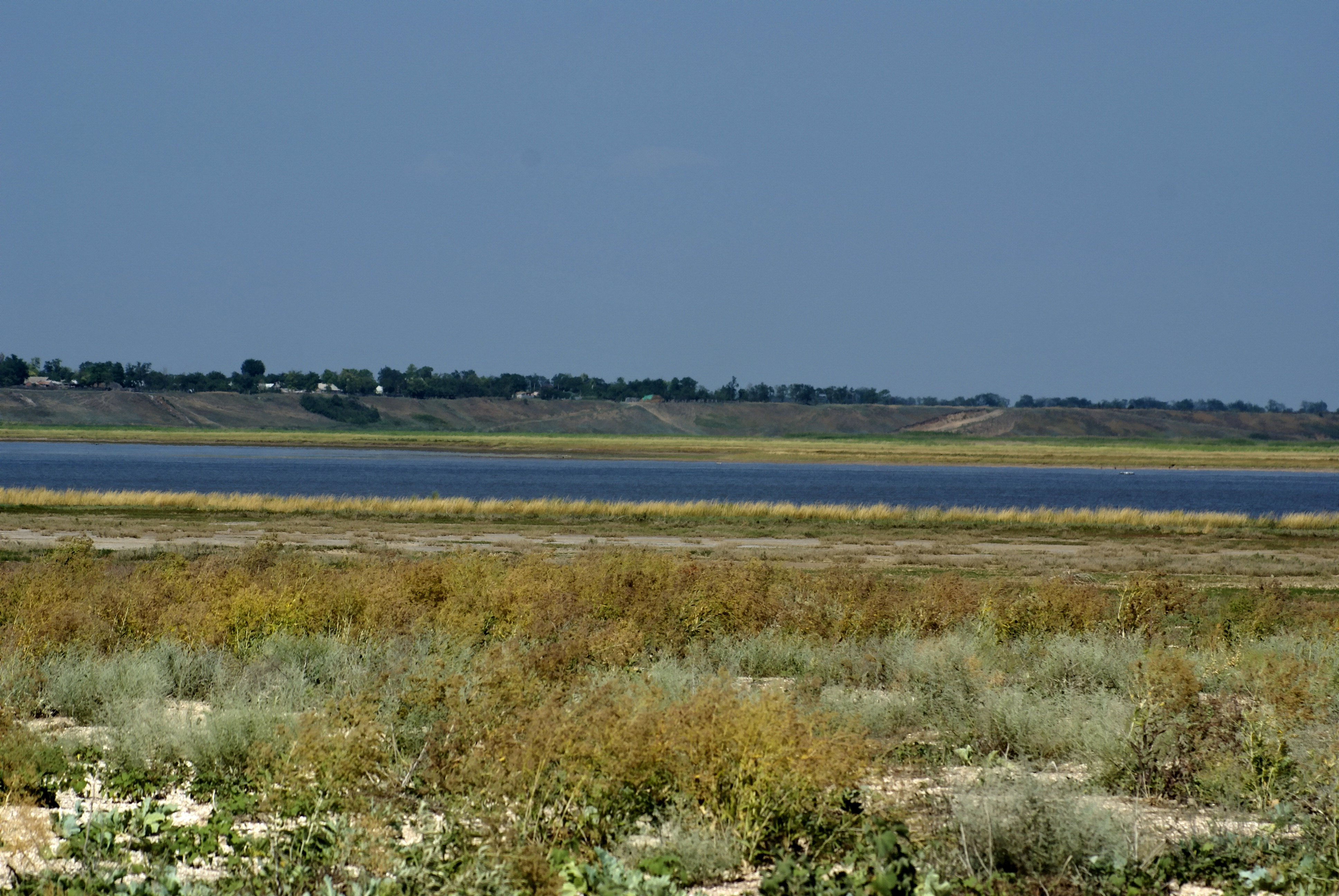 Yeysky District, Krasnodar Krai, Russia